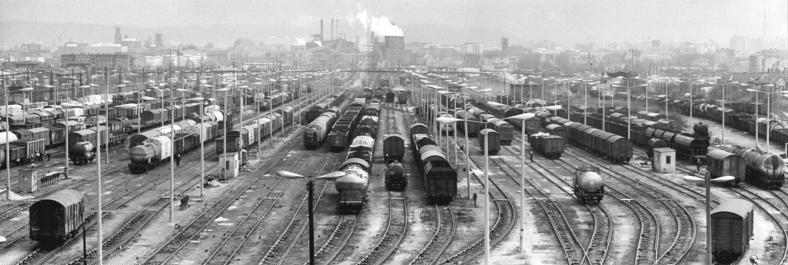 Dresden, Rangierbahnhof ADN-ZB Hiekel 6.1.1984 Dresden: Leistungsfähiger Güterverkehr-In der DDR haben sich die Transportleistungen von Eisenbahn und Binnenschiffahrt in den Jahren 1981 bis 1983 auf 105,5 Prozent erhöht. Ein Drittel der täglich rund 100 Züge, die von den Eisenbahnern des größten und leistungsfähigsten Rangierbahnhofes der Republik in Dresden-Friedrichstadt zusammengestellt werden, sind für den grenzüberschreitenden Verkehr bestimmt. Im Jahre 1983 rollten 1200 Züge mehr als geplant über diesen Verkehrsknotenpunkt. 2-teiliges Panorama